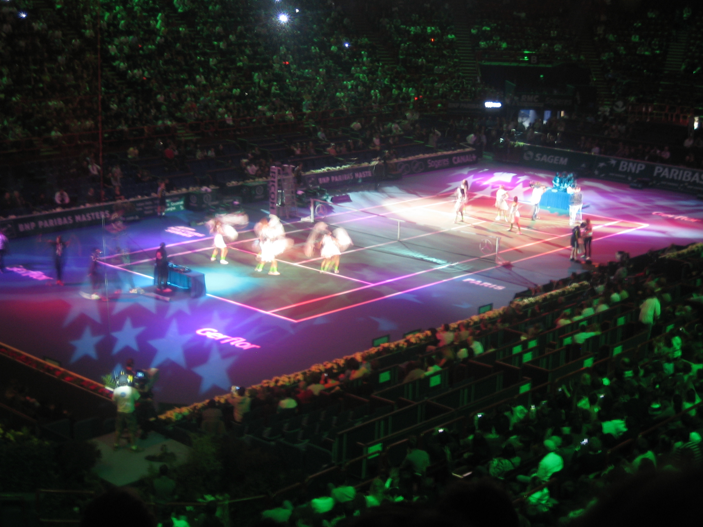 2008 BNP Paribas Masters